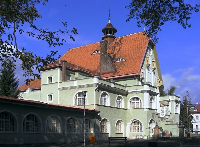 Dům dětí a mládeže